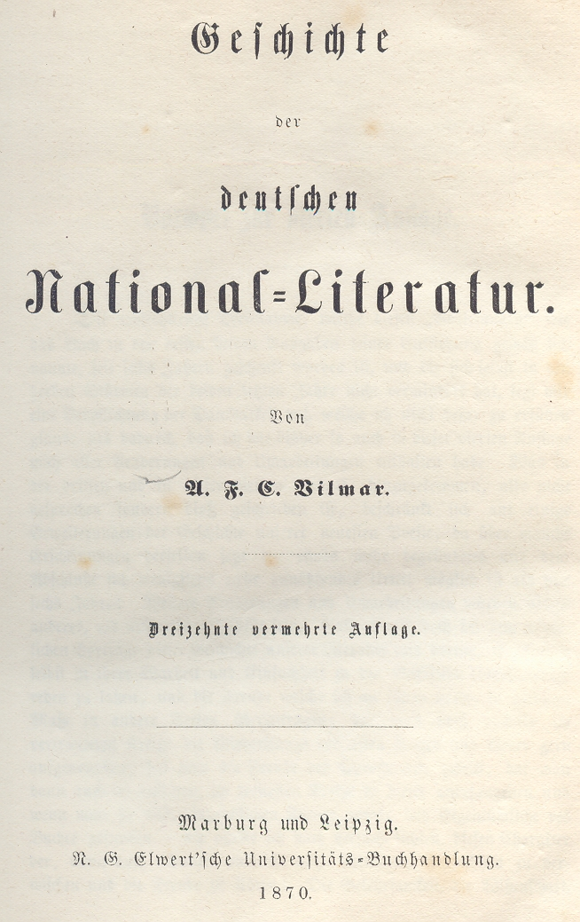 Geschichte der deutschen National-Literatur, Marburg/Leipzig 1870 Erzählungen, Wien 1826 (Titelseite)